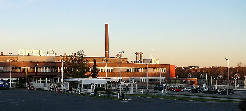 Adam Opel GmbH Werke Bochum II/III, eigenes Bild